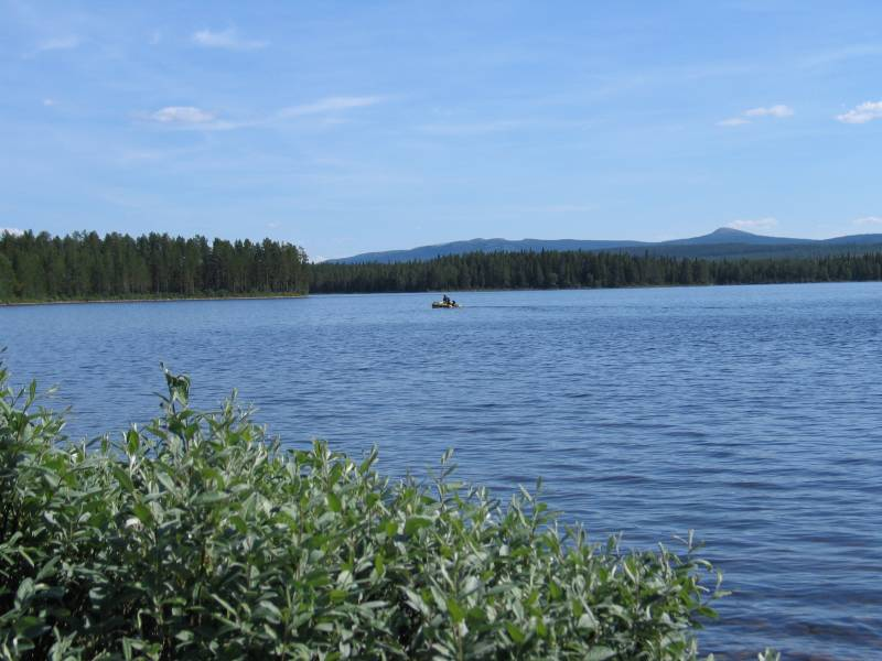 Der See (Stora) Börtnen bei Börtnan, Jämtland, Schweden; the lake Börtnen superior near Börtnan, Jämtland, Sweden